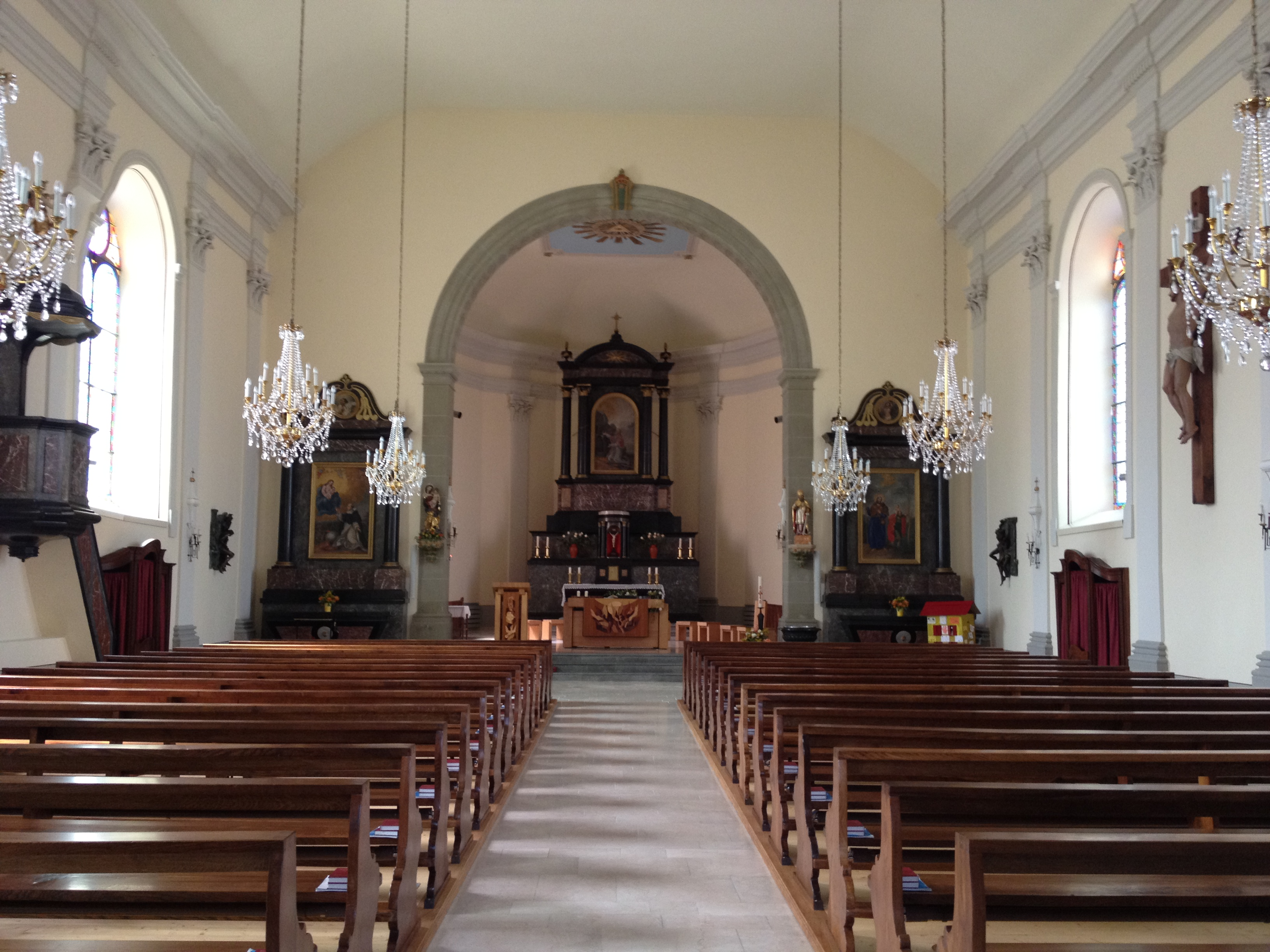 L'intérieur de l'église d'Estavayer-le-Gibloux